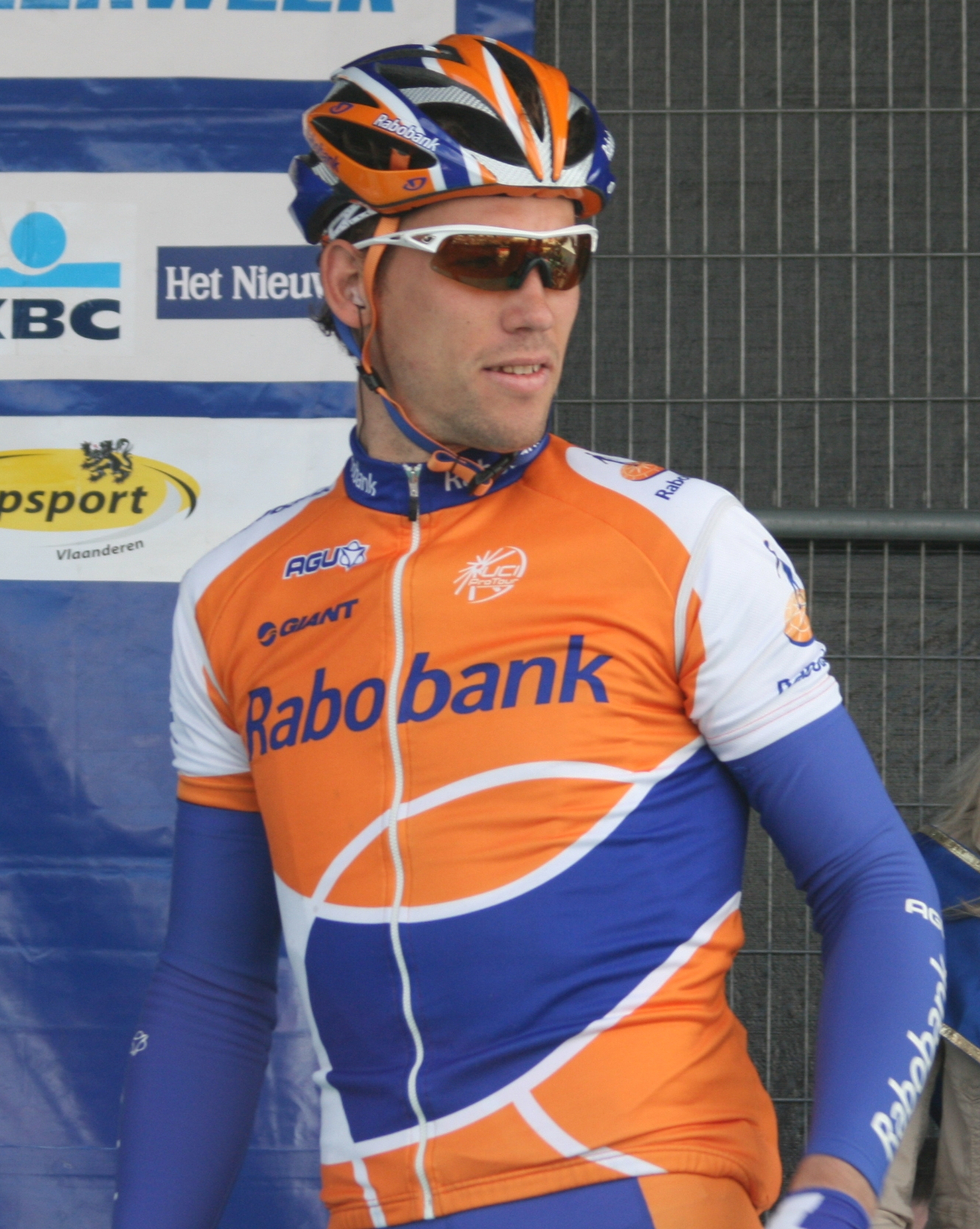 Maarten Tjallingii au départ du E3 Prijs 2009